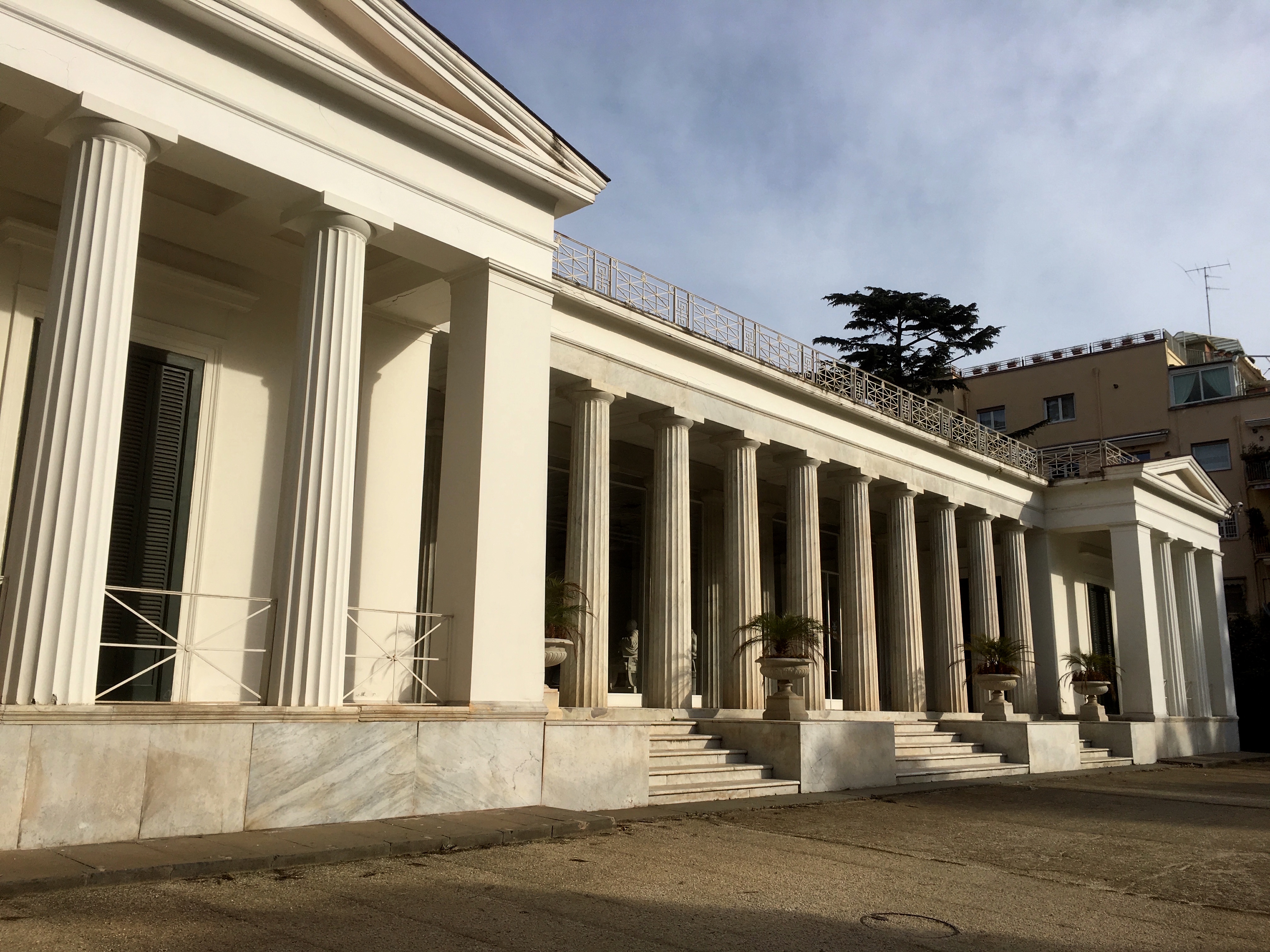 Nápoles. Villa Pignatelli.